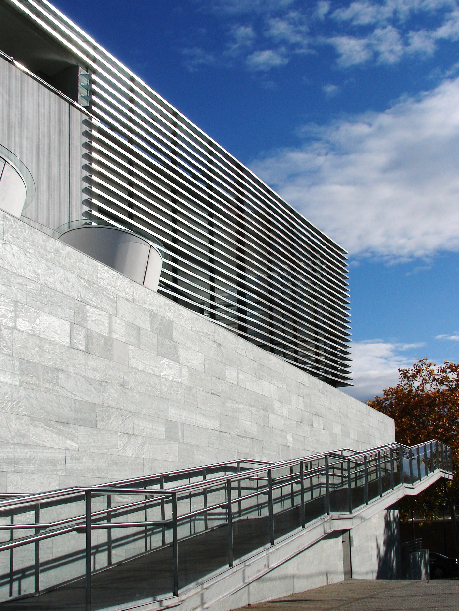 Biblioteca Municipal - Public Library - Lope de Vega (Tres Cantos) -Madrid